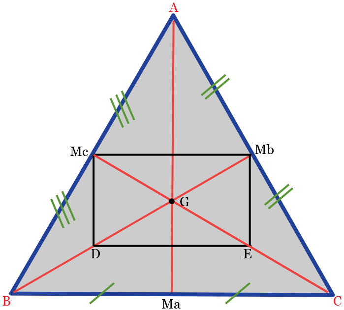 O desenho caracteriza a definição de Baricentro e Centro de Massa em um triângulo, revelando propriedades existentes entre o ponto de encontro das três diagonais (uma de cada vértice) e o ponto de equilíbrio do objeto geométrico.